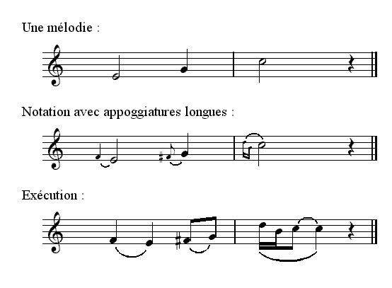 Description : Appoggiature longue Source : Personnelle Licence : GFDL